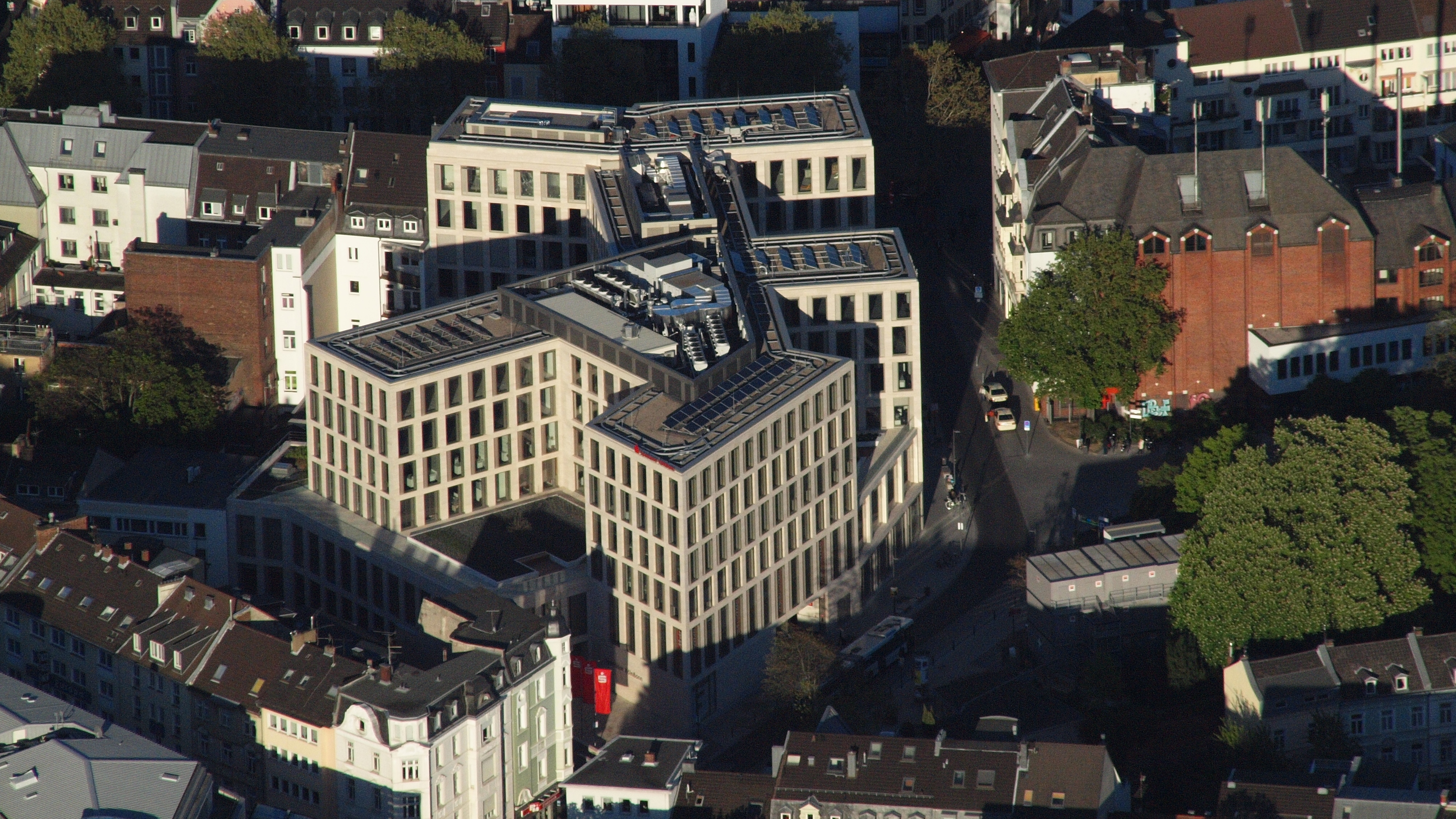 Neubau der Sparkasse KölnBonn (fertiggestellt 2014), Friedensplatz, Bonn: Luftaufnahme